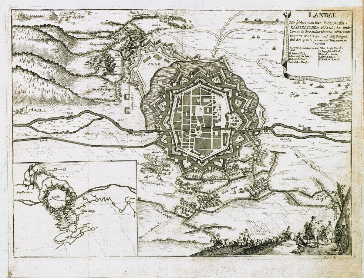 original: Landau wie solches von Ihro Römischen Kayserlichen Mayestät unter Comando Ihro Mayestät des Römischen Könichs nachts den und Iuly Belagert und den 9. 7tber per Accord Eingenomen worden Kupferstich, Belagerung von Landau 1702 nach Westen ausgerichteter Grundriss der Festung mit Legende Nebenkarte mit den Stellungen beim Angriff